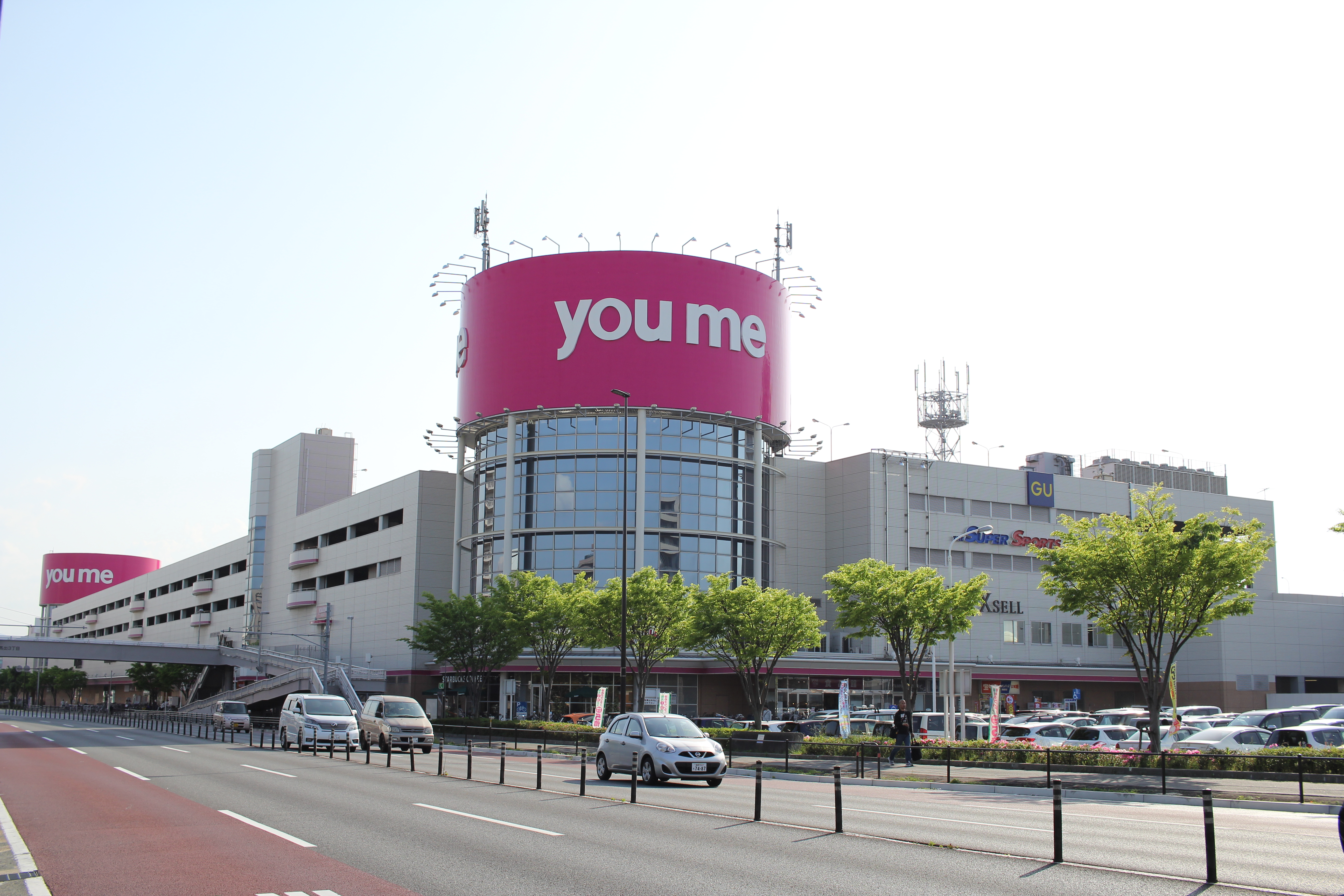 ゆめタウン博多 Canon EOS 60D